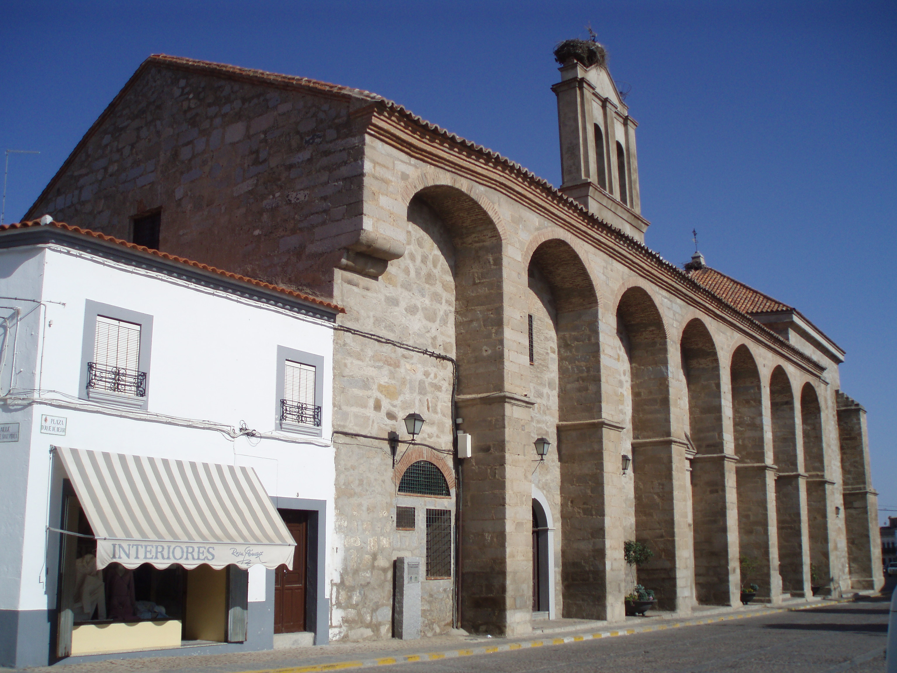 Vista exterior del Convento de las Madres Concepcionistas (Plaza del Dúque de Béjar), en Hinojosa del Duque (Córdoba) (Andalucía) (España)